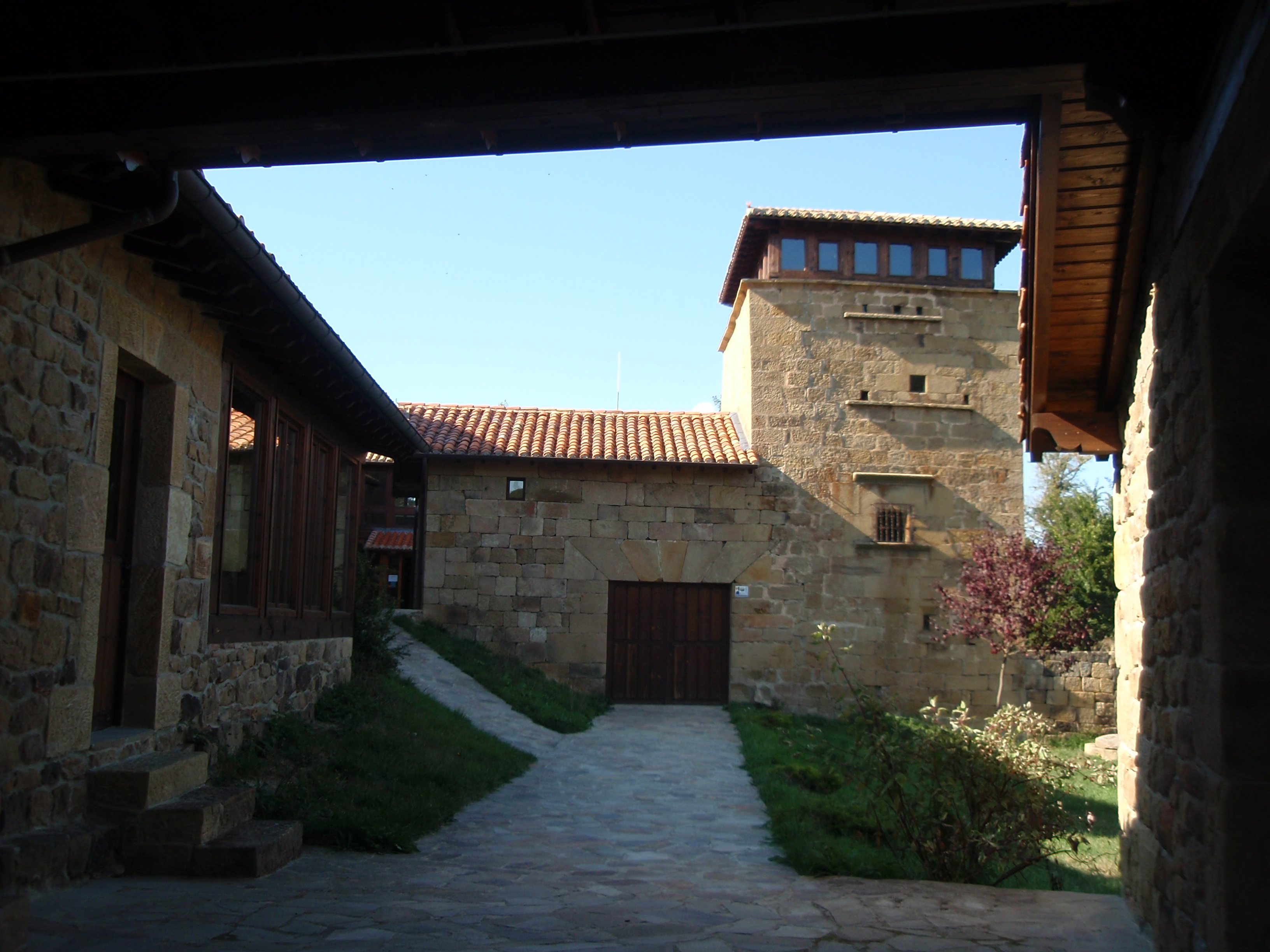 Centro de Interpretación de Monte Hijedo, en Riopanero; Valderredible (Cantabria).